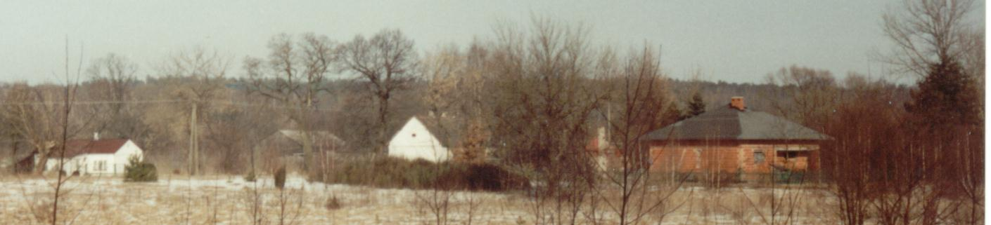 Zimowa Panorama Raducza